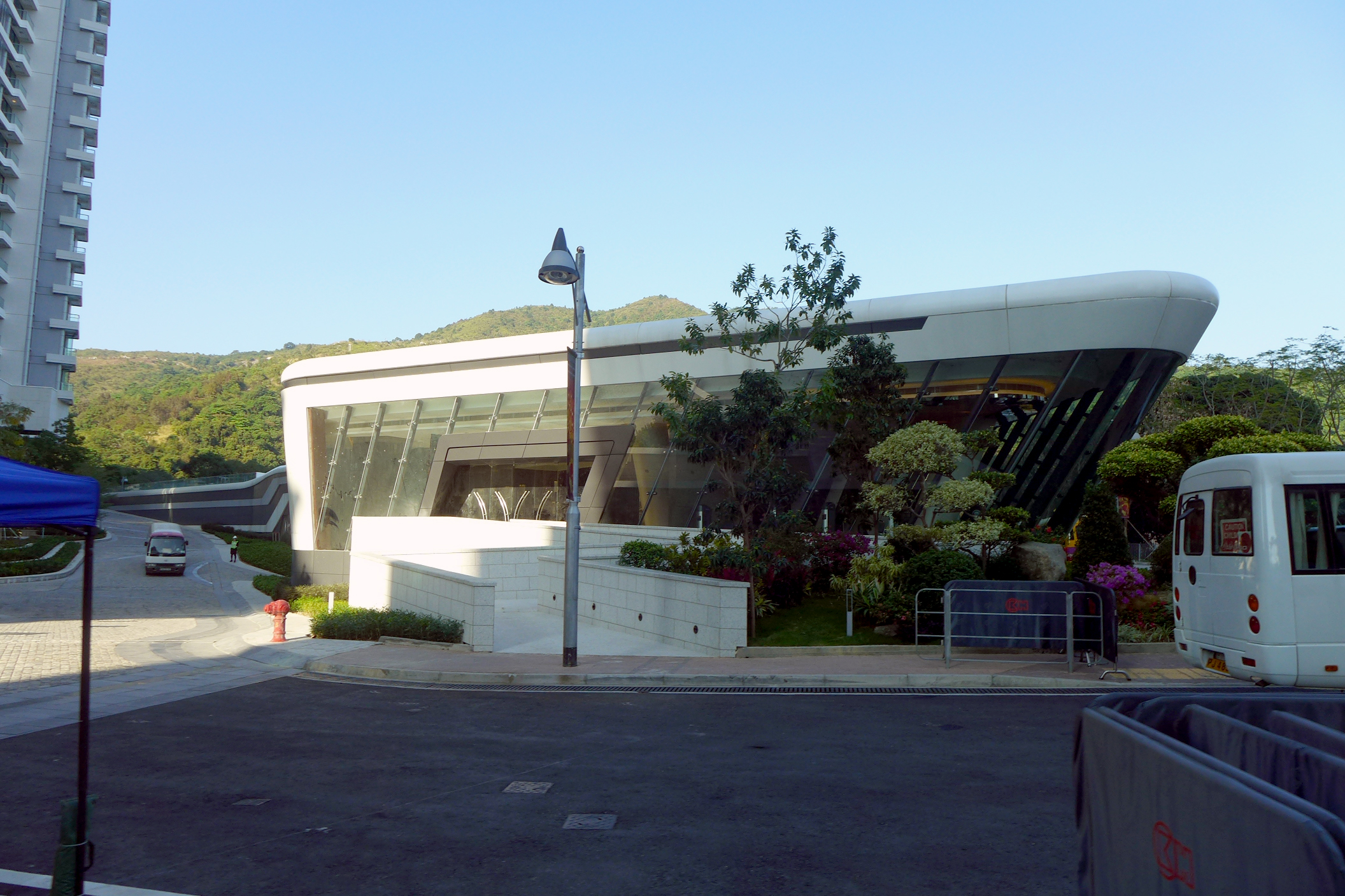 Mont Vert, Tai Po